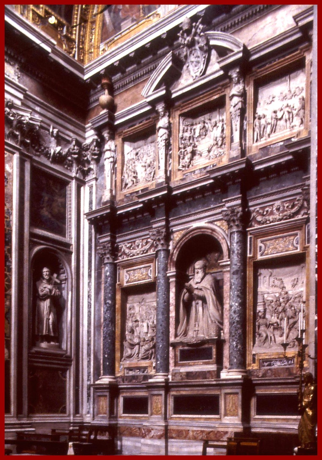 Grabmal von Papst Sixtus V. in der Basilika Santa Maria Maggiore, Rom